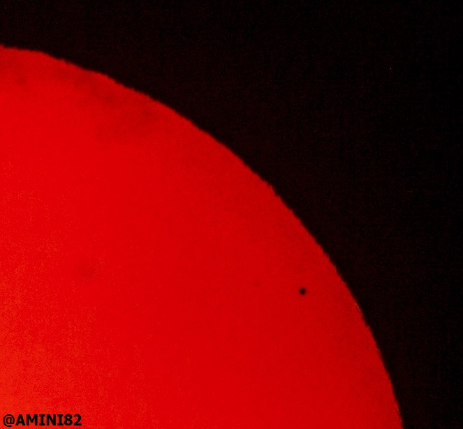 صورة لكوكب عطارد خلال العبور الـ11 من نوفمبر سنة 2019